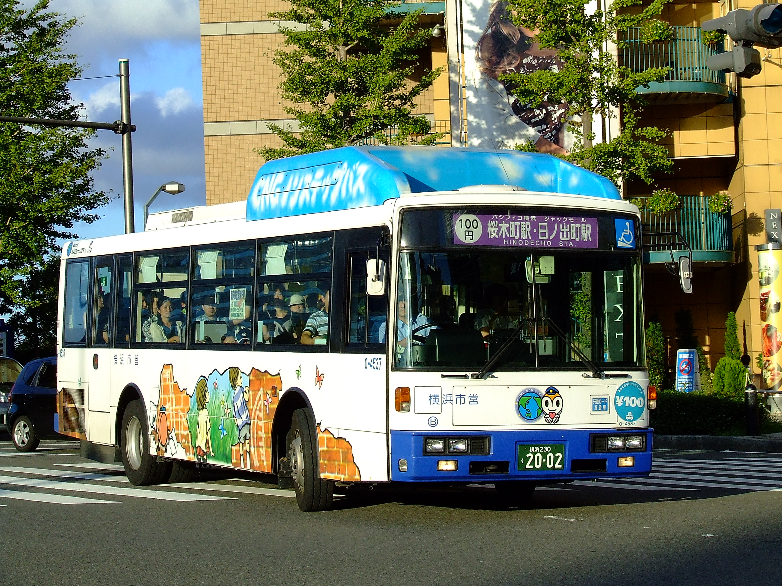 横浜市営バス滝頭営業所所属0-4537号車 みなとみらい100円バス運用中 桜木町駅前にて